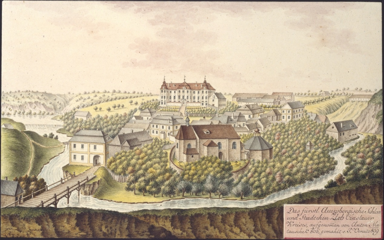 Zámek Žleby Das fürstl. Auersbergische Schloss und Staedtchen Zleb Cžaslauer Kreises, aufgenommen von Anton Matauschek 1806 gemahlt v. J. Venuto 1809